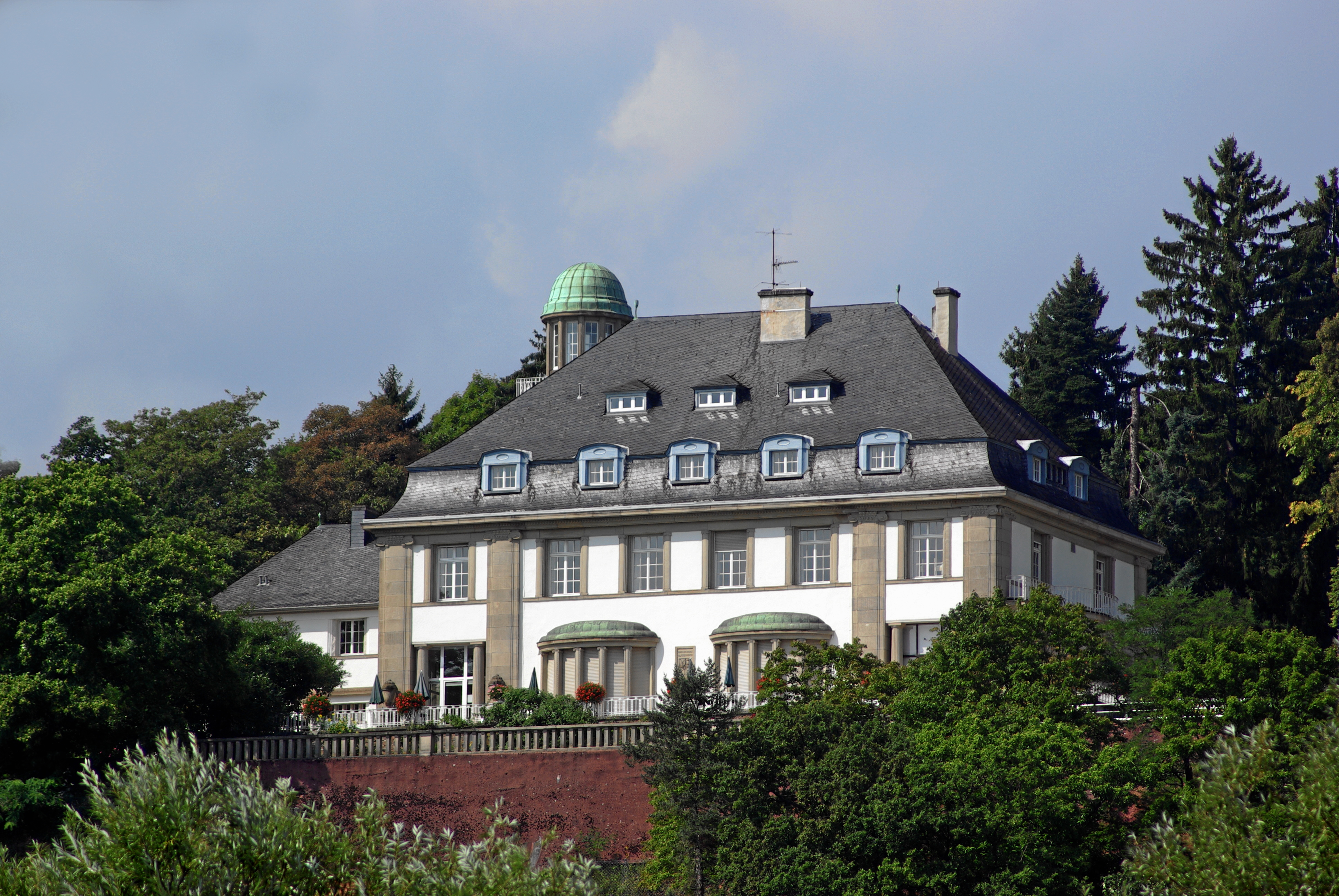 Trier, Villa Reverchon, in großem Park mit terrassiertem Garten gelegene mehrteilige, zu den bedeutendsten Villen der Stadt zählende Anlage, klassizistische Jugendstilbauten, wandfeste Ausstattung, 1909–12, Architekt Rudolf Tillesen, Mannheim (Ausführung durch Peter Marx); stadt- und landschaftsbildprägend